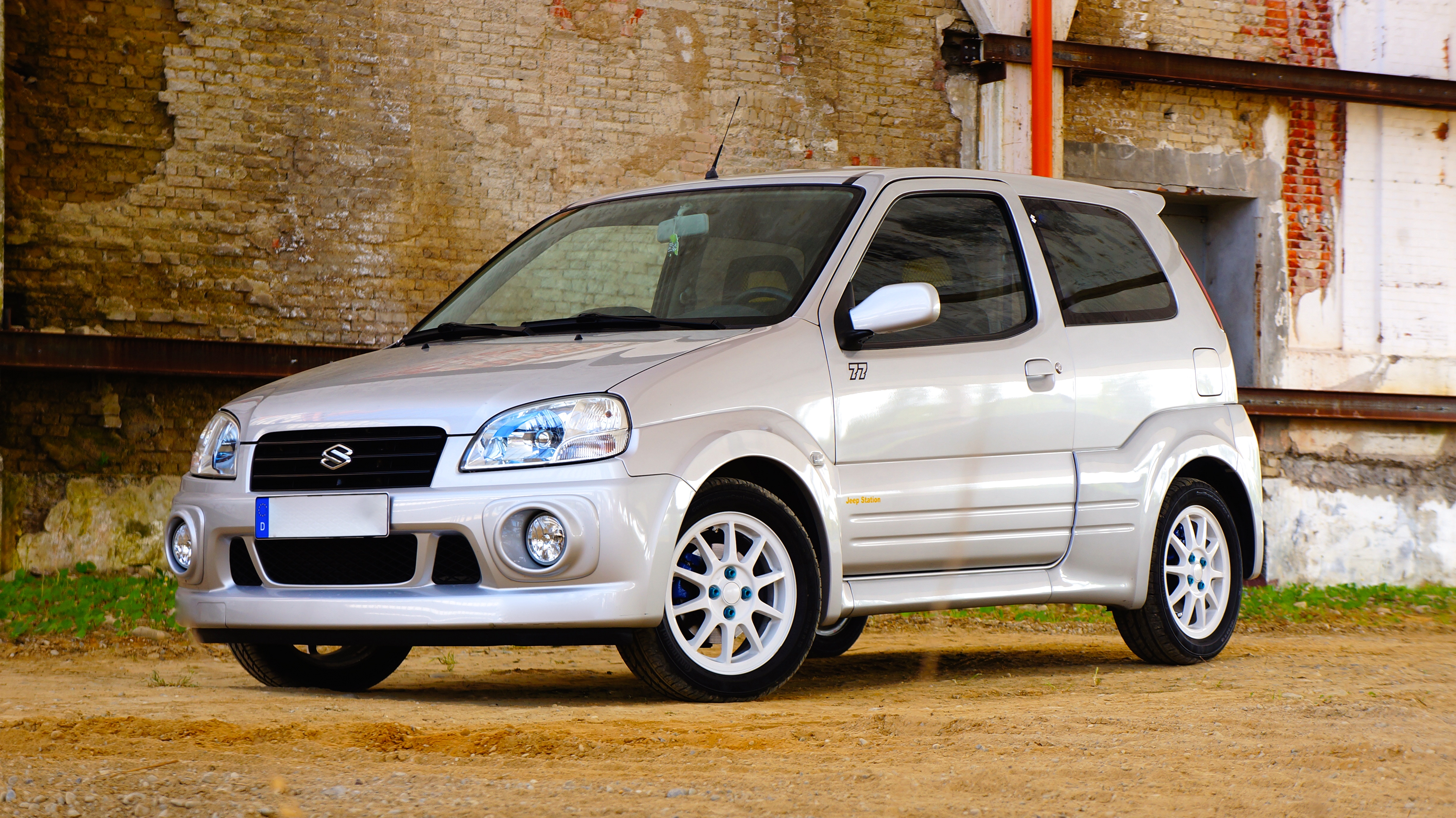 Suzuki Ignis Sport Model HT81S